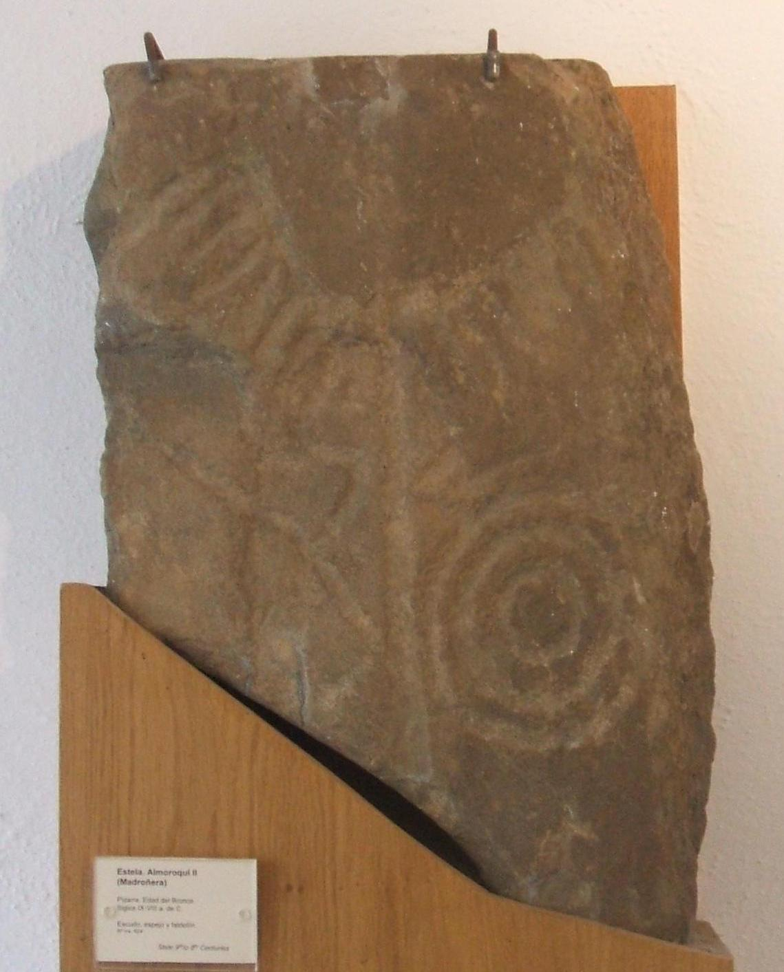 Madroñera estela. Almoroquí II. Pizarra. Edad del Bronce. Siglos IX-VIII aC. Escudo, espejo y faldellín.